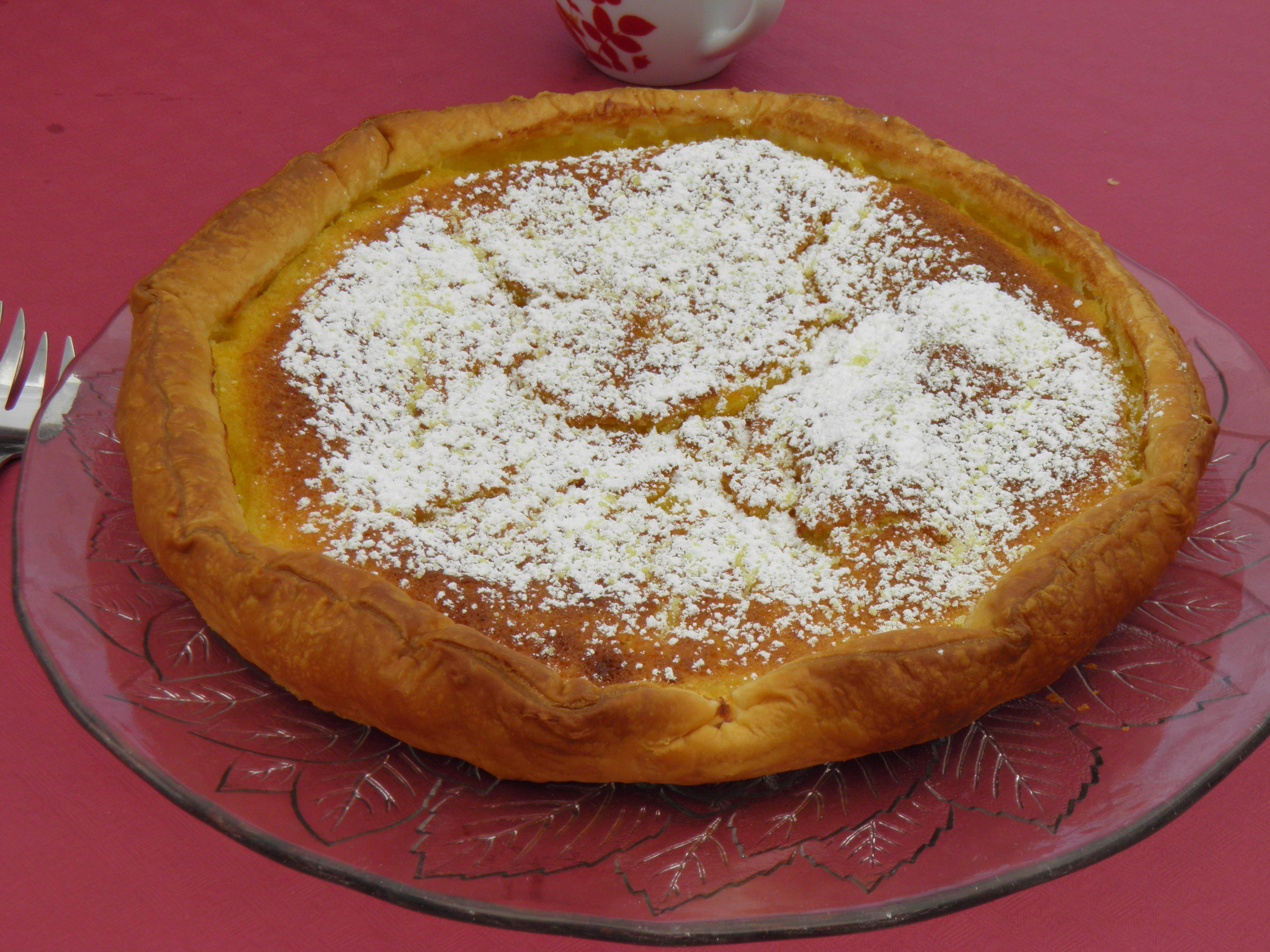 Tarte au flan à Elsenheim (Bas-Rhin, France).